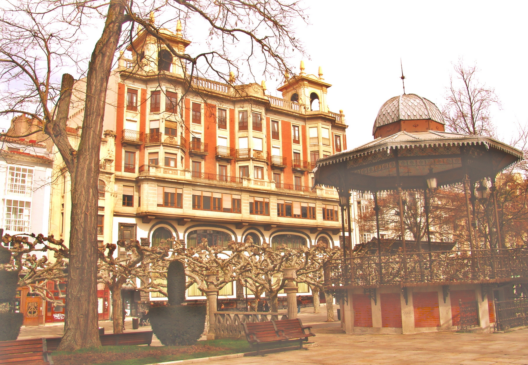 Vista del edificio del Círculo de l Unión (Casino), Paseo del espolón, Burgos, España.